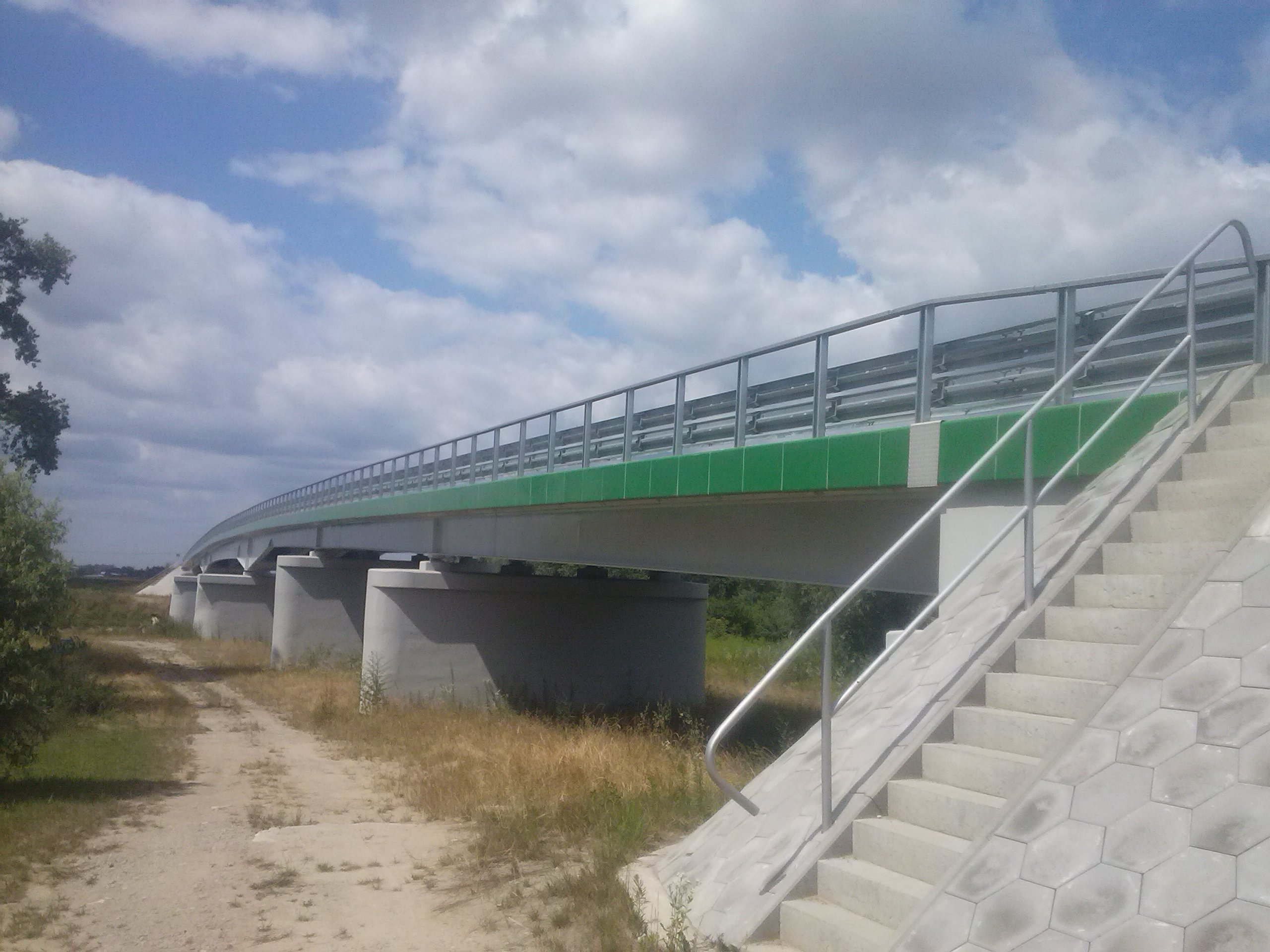 Most w Rzuchowie na Sanie z 2018 roku, po generalnej odbudowie